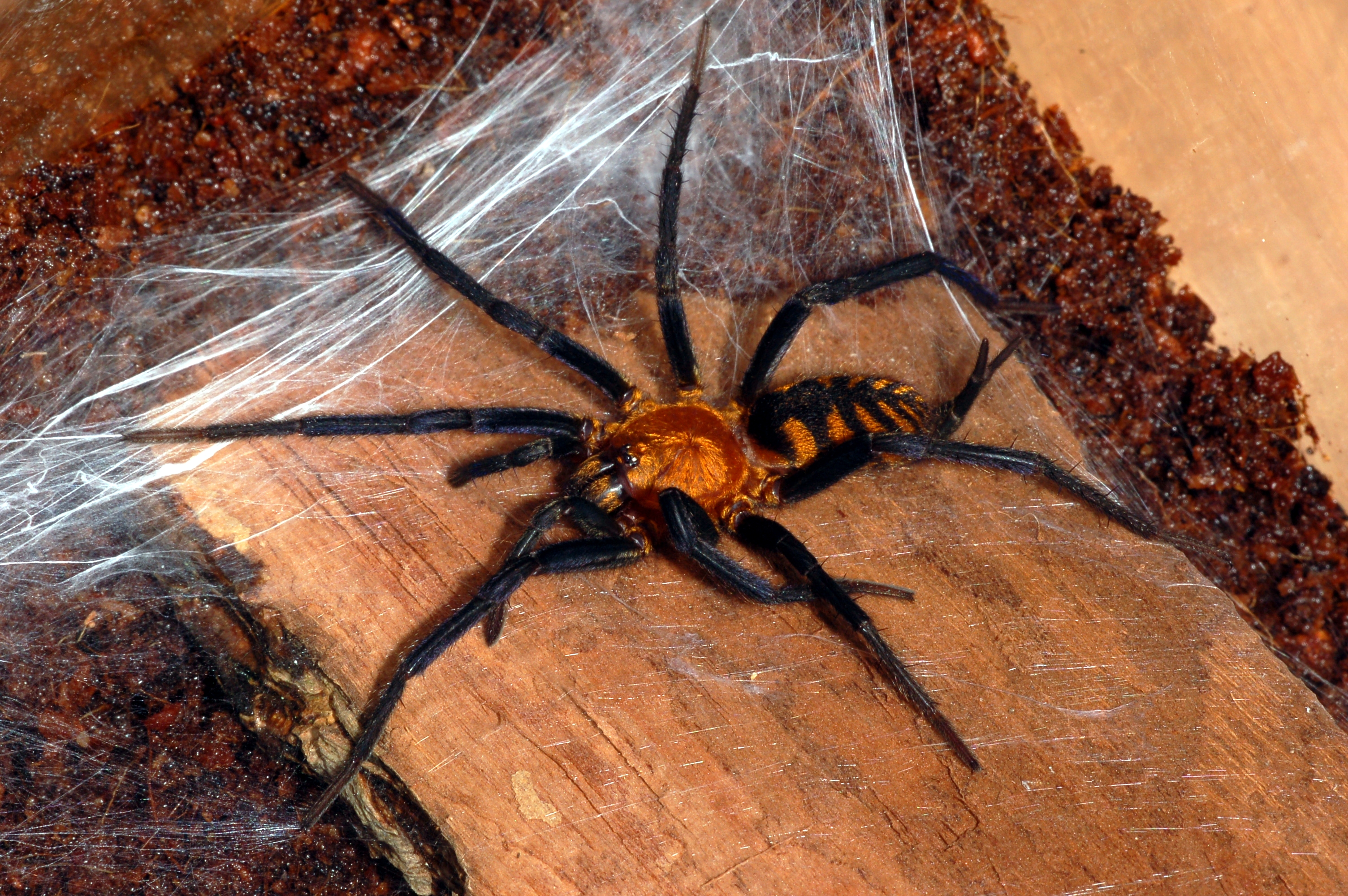 Doppelschwanzspinne Linothele fallax (Fam. Dipluridae) in Gefangenschaft, Museum Wiesbaden, Deutschland